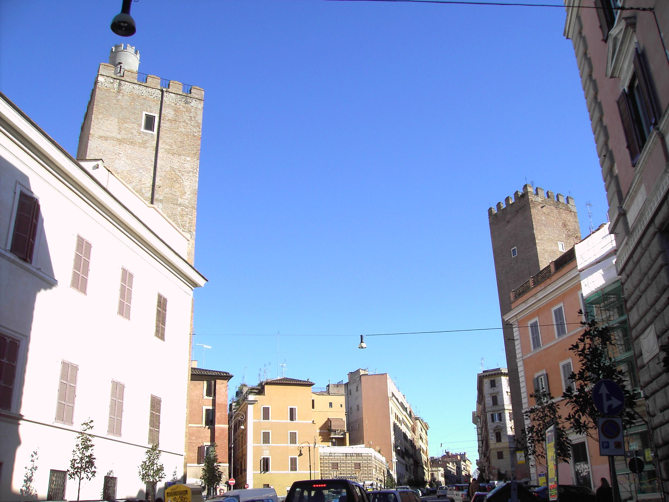 Roma, via Cavour: le torri dei Capocci e dei Graziani.